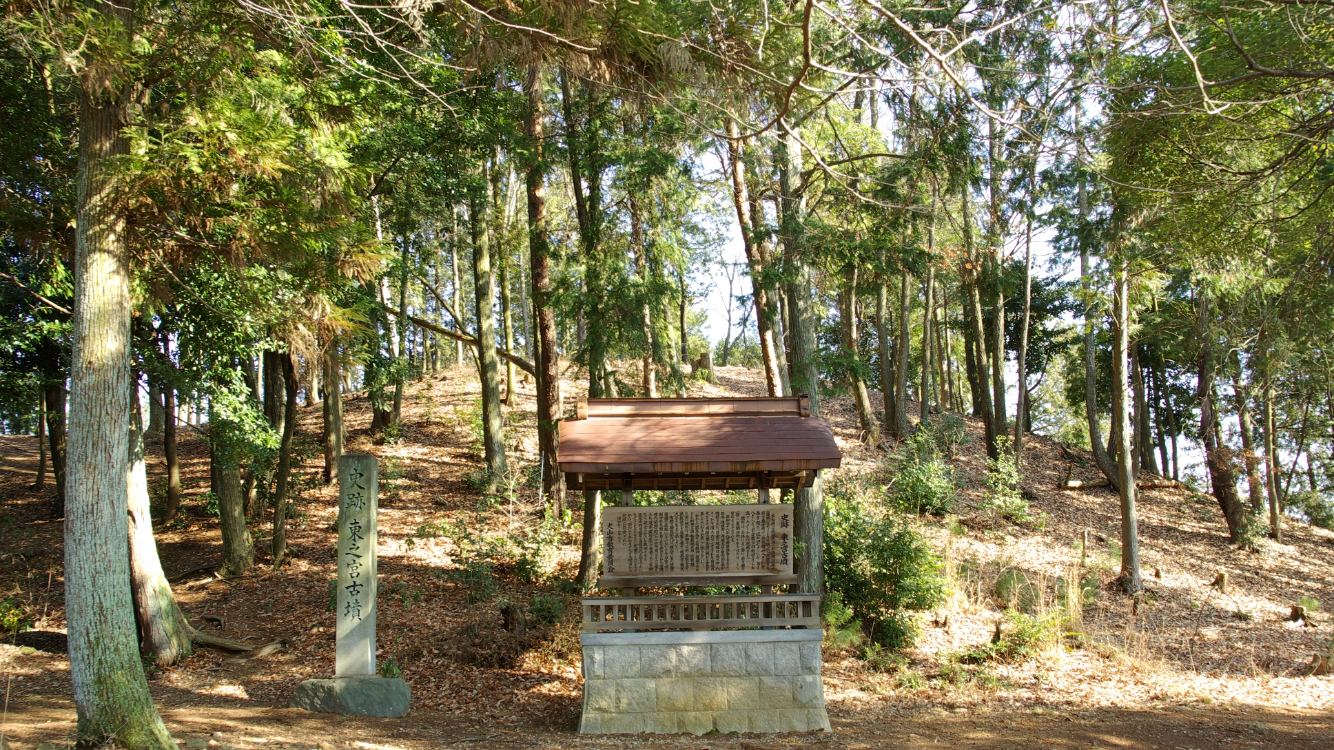 犬山市東之宮古墳の後方部と標石